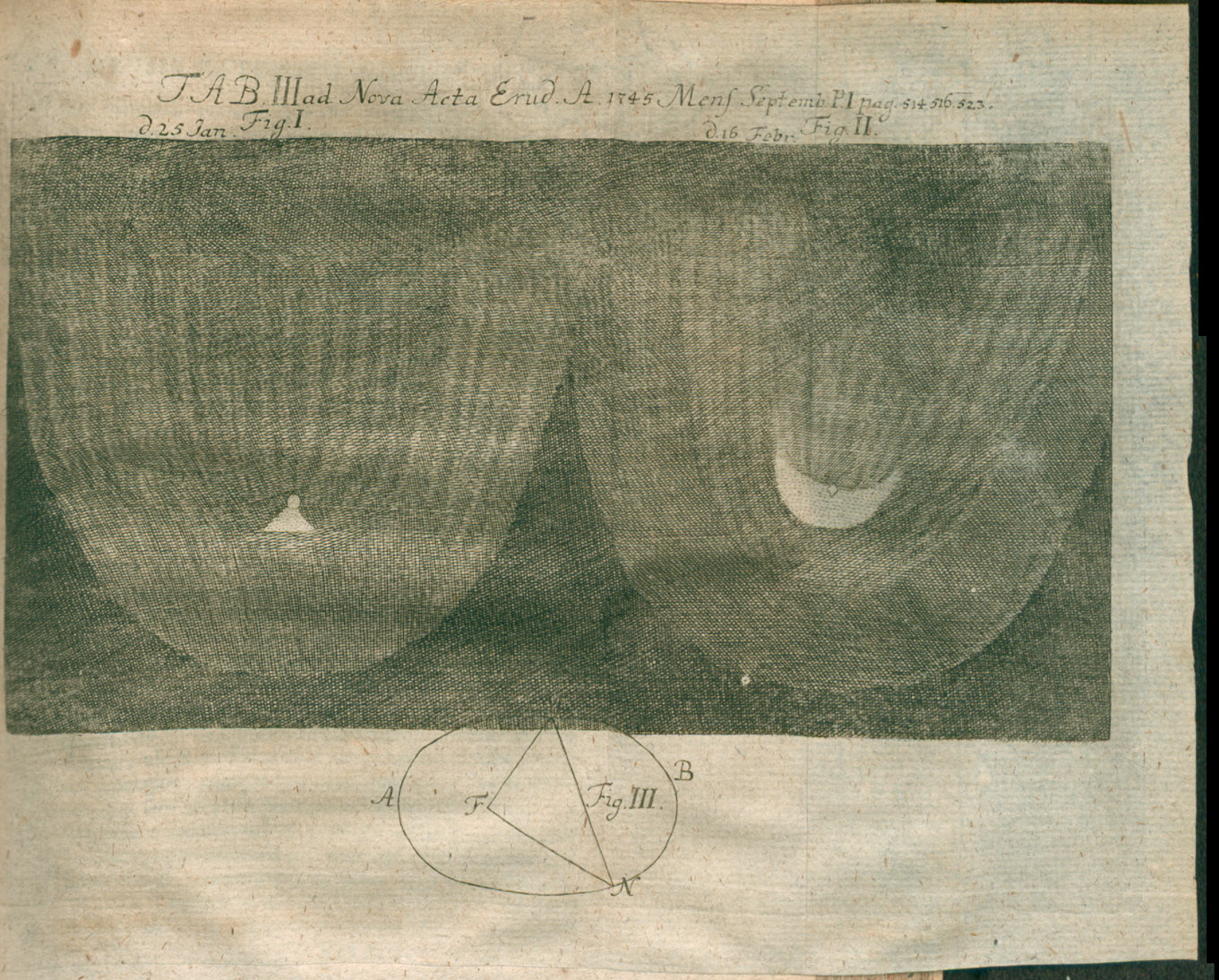 Illustration